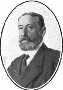 Fotografía del político español Pedro Rodríguez de la Borbolla publicada en 1913 con motivo de su nombramiento como ministro de Gracia y Justicia en el gobierno presidido por el conde de Romanones